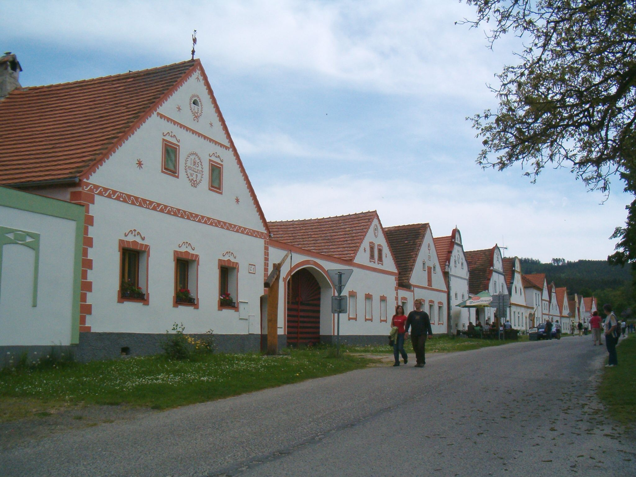 Holašovice